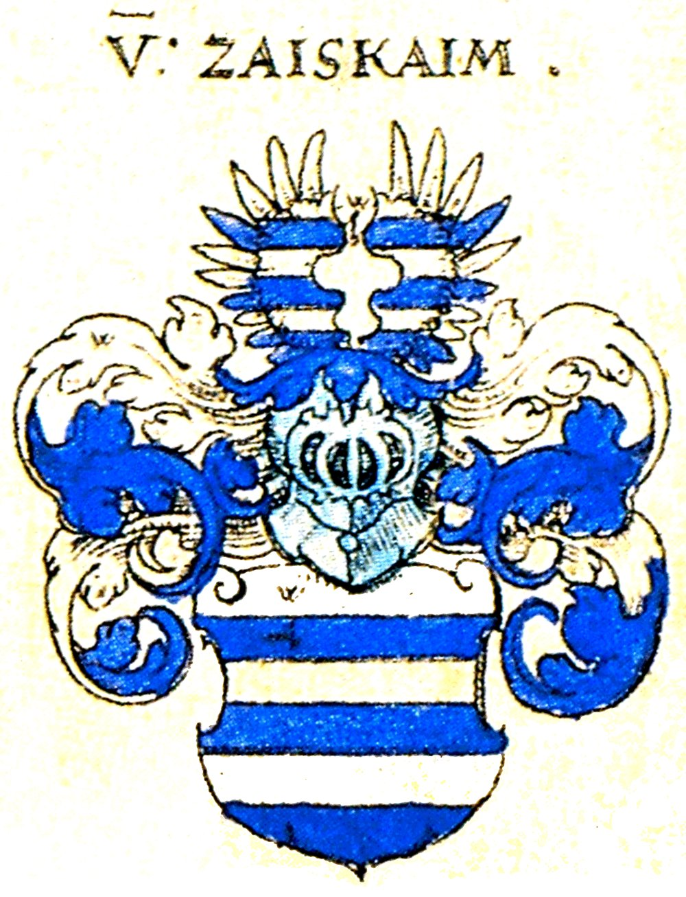 Ritterschaft und Adel in Schwaben von Zaiskaim